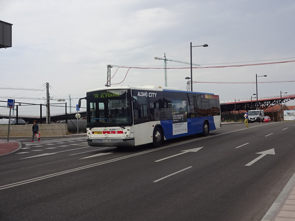 Autobús interurbano de León en la avenida Palencia de la ciudad